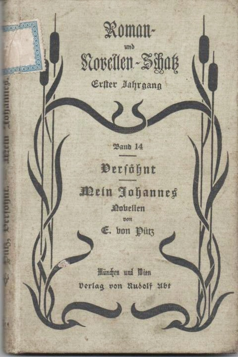 Everilda von Pütz geb. von Klenze (1843-1926), deutsche Adelige und Schriftstellerin, Buchcover